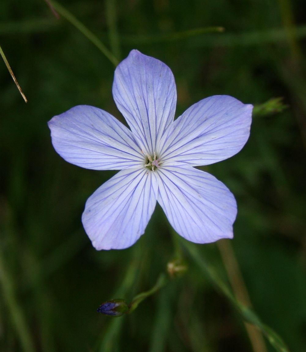 Linum narbonense, Leingewächse (Linaceae) - Slowenien/Slovenija/Slovenia: Primorska, Berg Slavnik bei Podgorje, Gipfelbereich